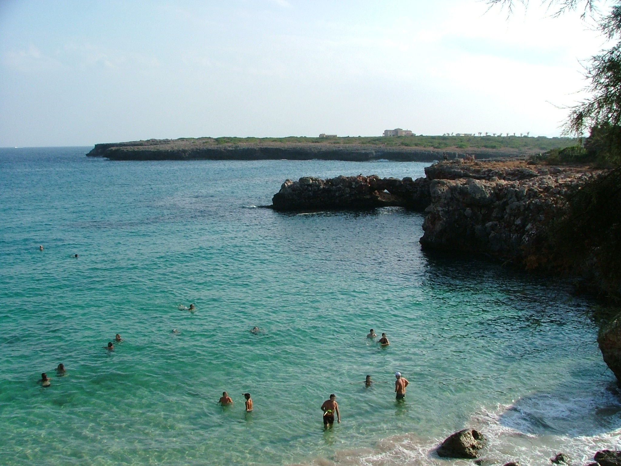 Cala Morlanda, Porto cristo, Mallorca, Spain